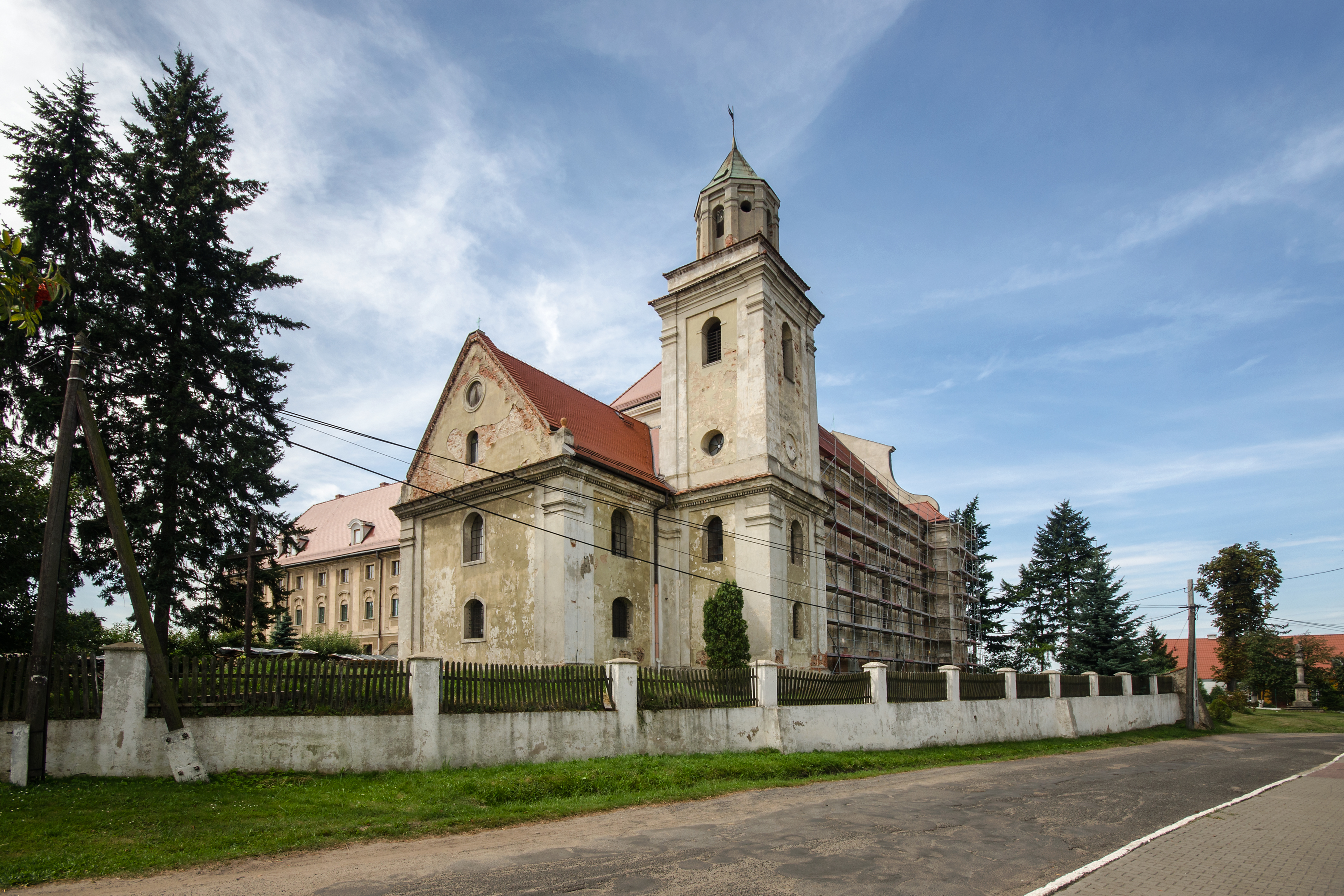 Głębowice, kościół, ob. par. p.w. św. Eliasza Proroka, 1676, 1746-1762, pocz. XX